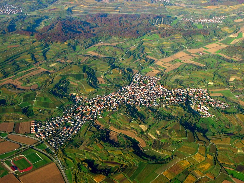 Luftbild von Malterdingen